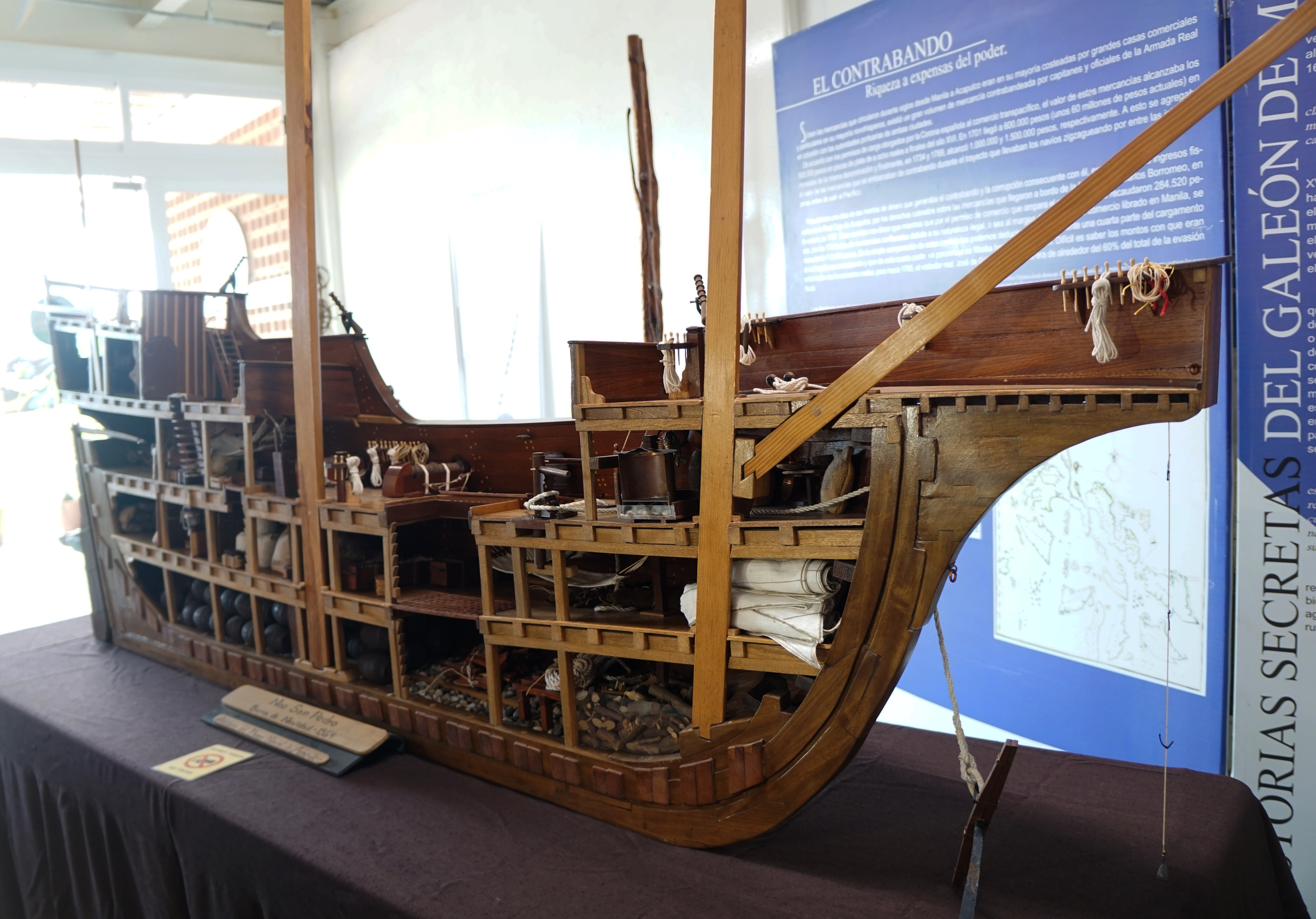 La Nao San Pedro. réplica a escala de la Nao que realizo en primer viaje de retorno desde Asia a américa, por el océano Pacífico.